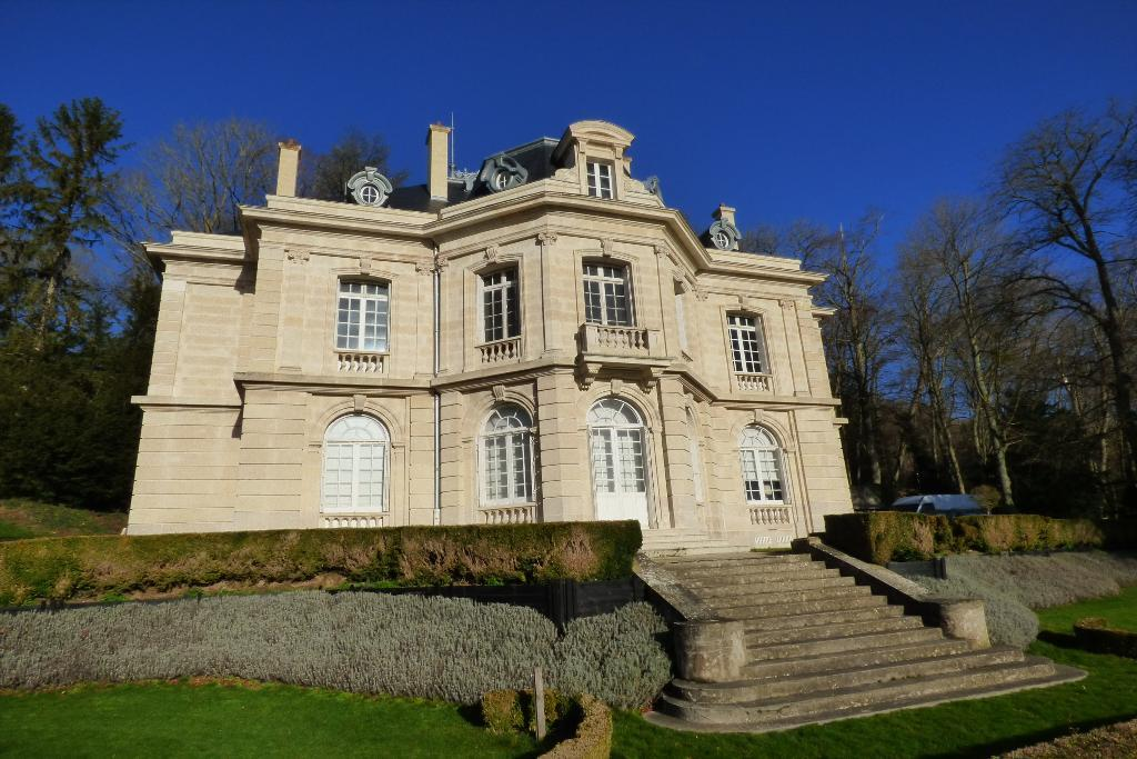 Châteaude Bellevue, Fontenoy